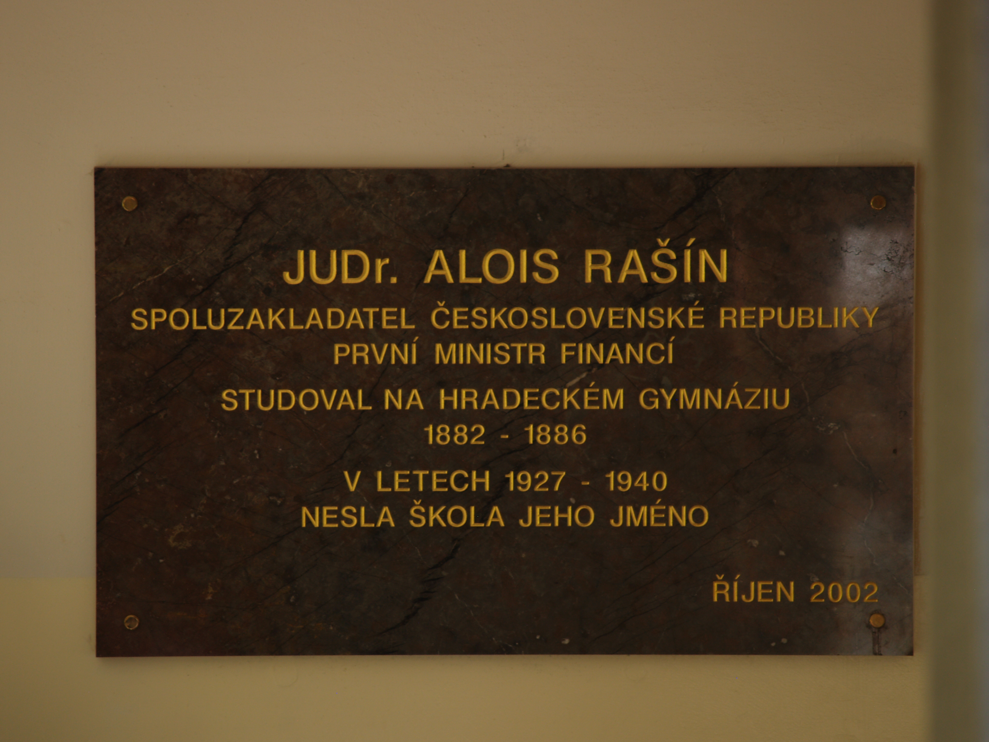 Pamětní deska Aloise Rašína umístěná v prvním patře Gymnázia J. K. Tyla v Hradci Králové.